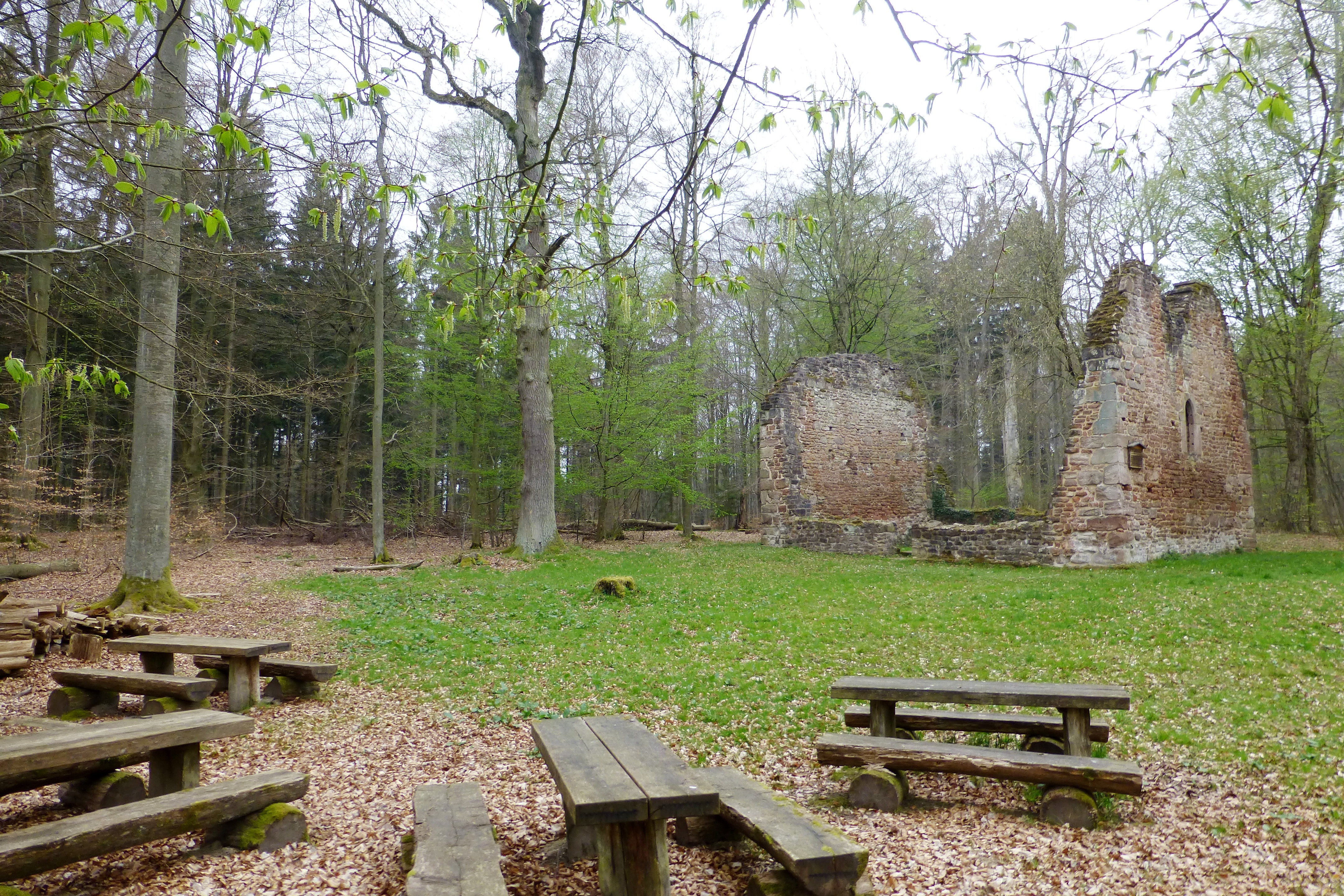 Kirchenruine der Wüstung Leisenberg im Gillersheimer Wald nahe Sudershausen, Südniedersachsen. Erbaut um 1300